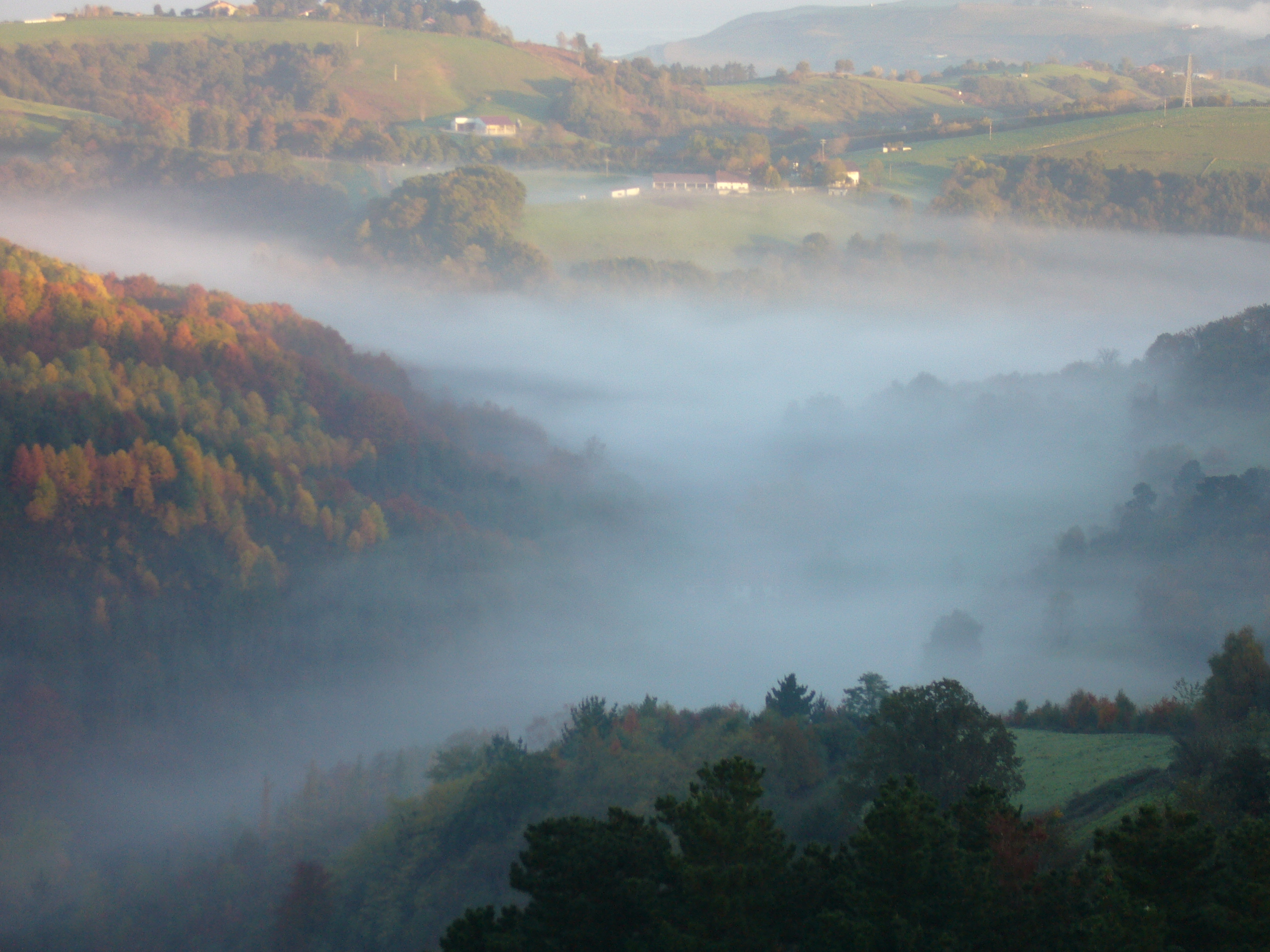 Behe lainoa Ibarrolako ibarrean, Aia.